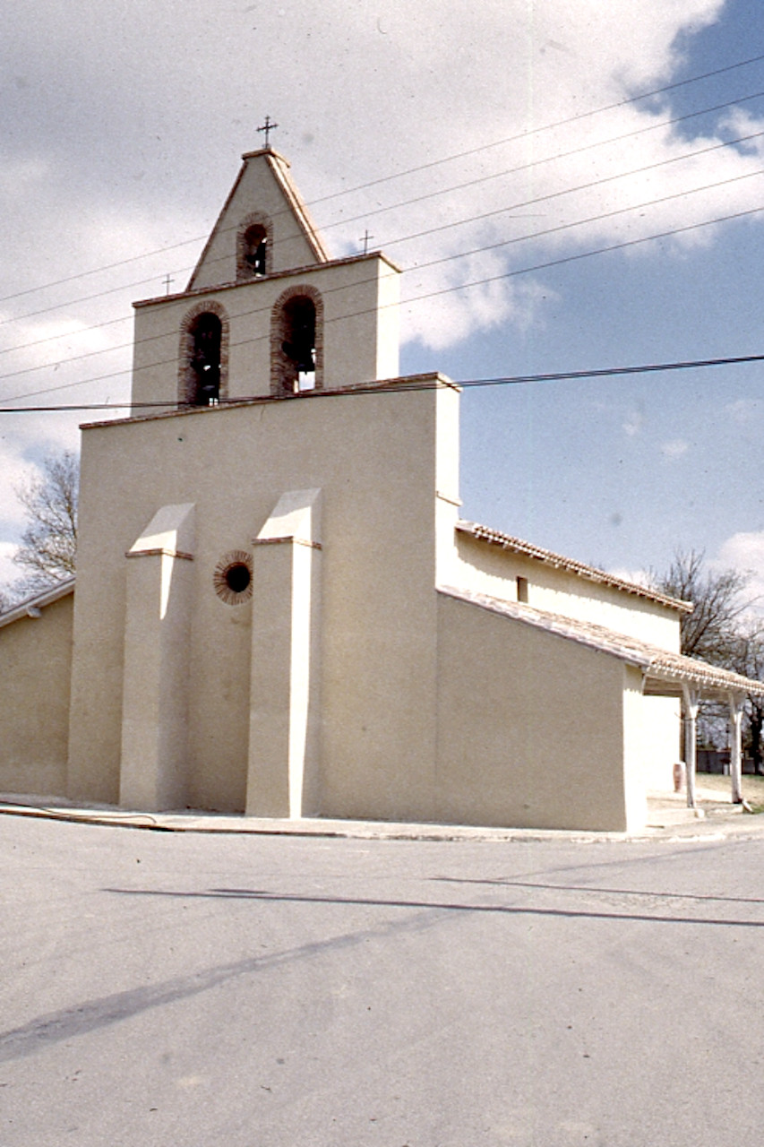 L'église de la Nativité de Notre-Dame à Clermont-Savès en cours de rénovation (mars 1997).